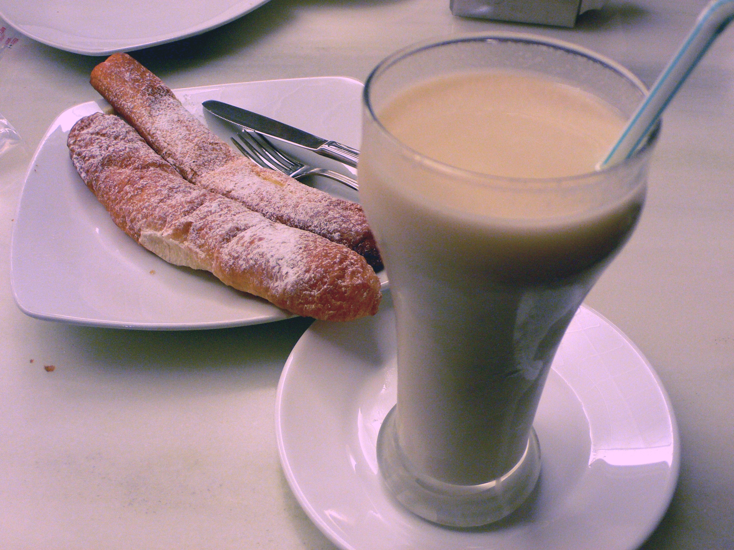 Horchata, servida en una horchatería de Valencia.